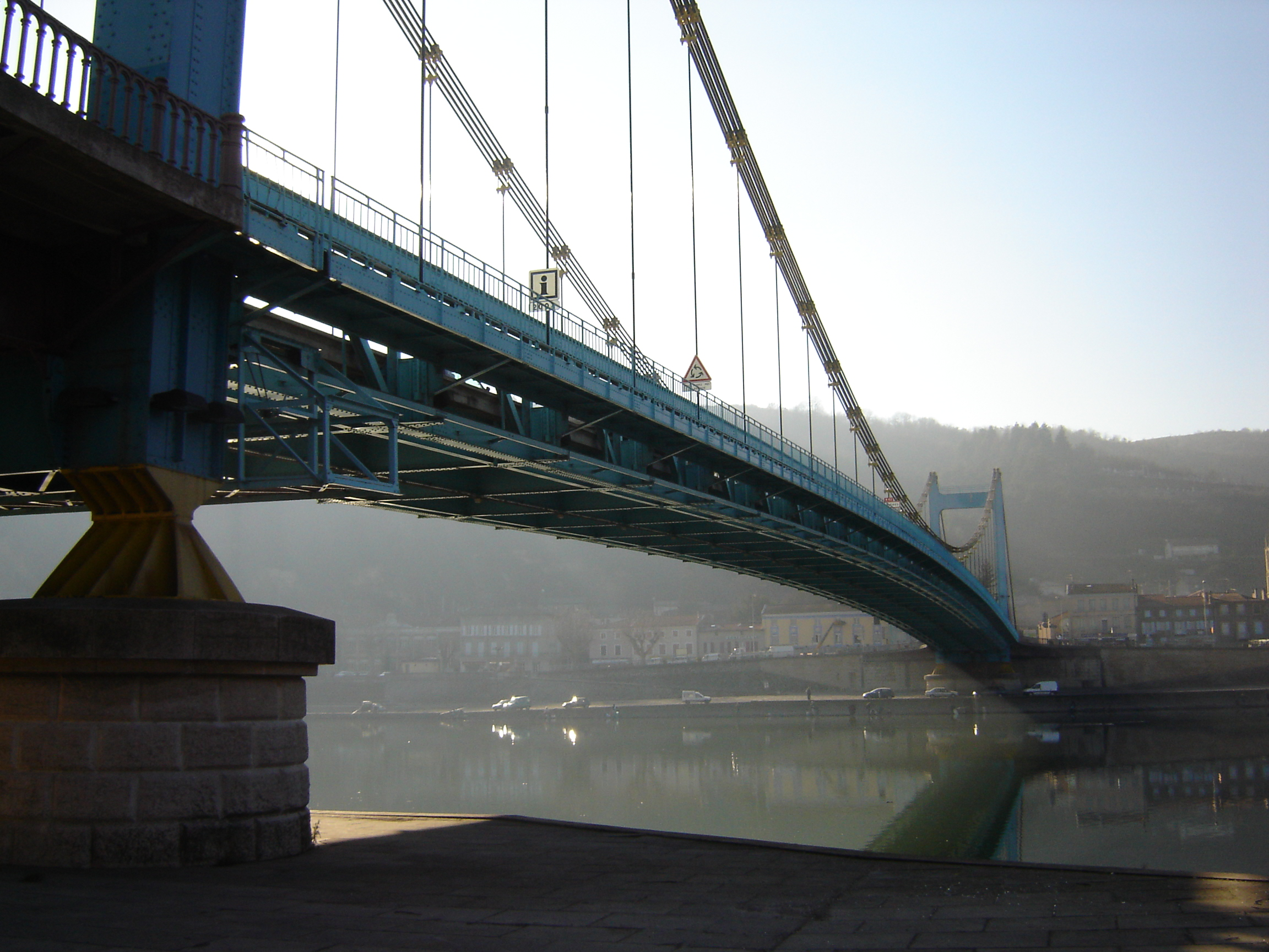 Serrières (Ardèche), le pont suspendu